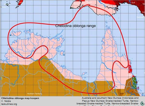 Chelodina oblonga, range koopen map